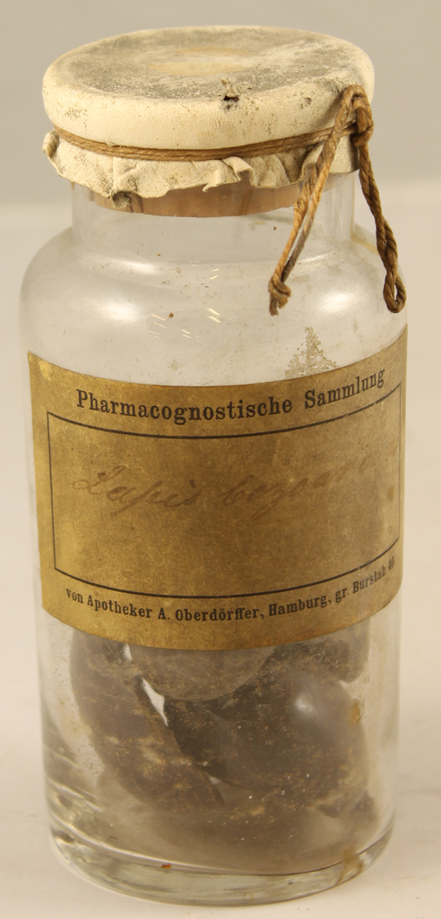 Zylindrisches Glas mit Korkstöpsel, dieser ist von einem festgeschnürten Leder überspannt. Inhalt: 50%. Papieretikett mit Aufdruck: "Pharmacognostische Sammlung" (oben) und "A. Oberdörffer, Hamburg, gr. Burstah 40" (unten); mittig handschriftlich die Anga